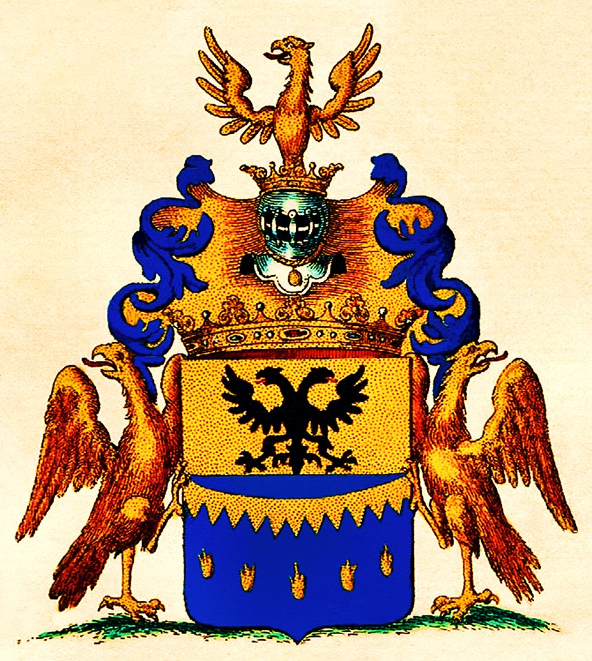 Wappen der Grafen von Bellegarde 1741